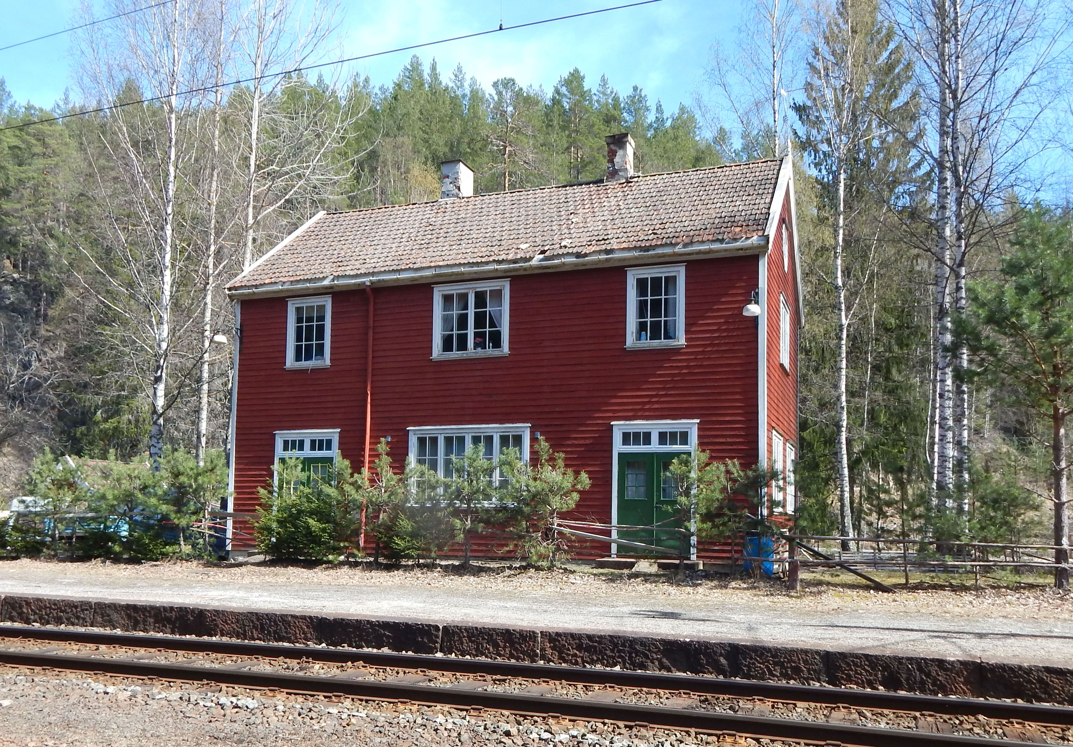 Valebø stasjon på Bratsbergbanen